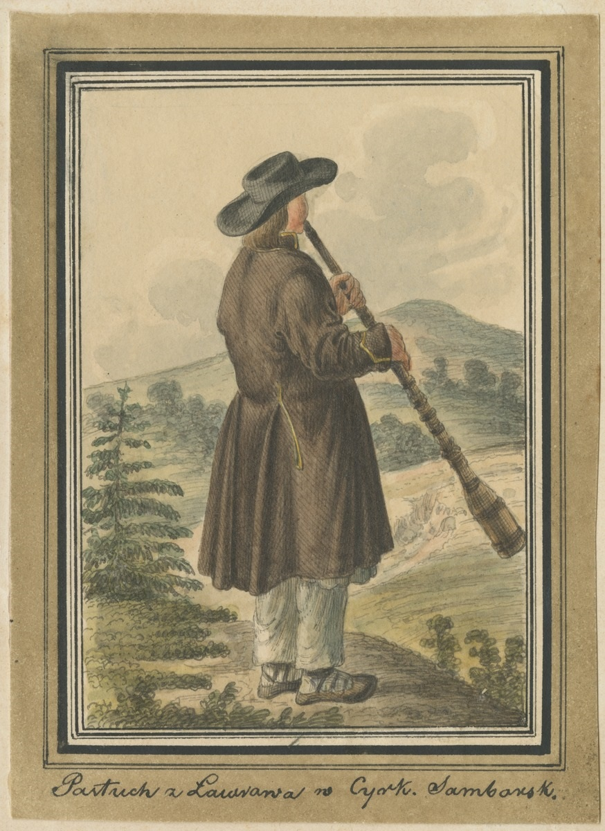 Pastuch z Ławrania w Cyrk.Samborsk. Mężczyzna dmący w trombitę, w czarnym płaskim kapeluszu, brązowej sukmanie i białych portkach, stojący profilem na szczycie góry